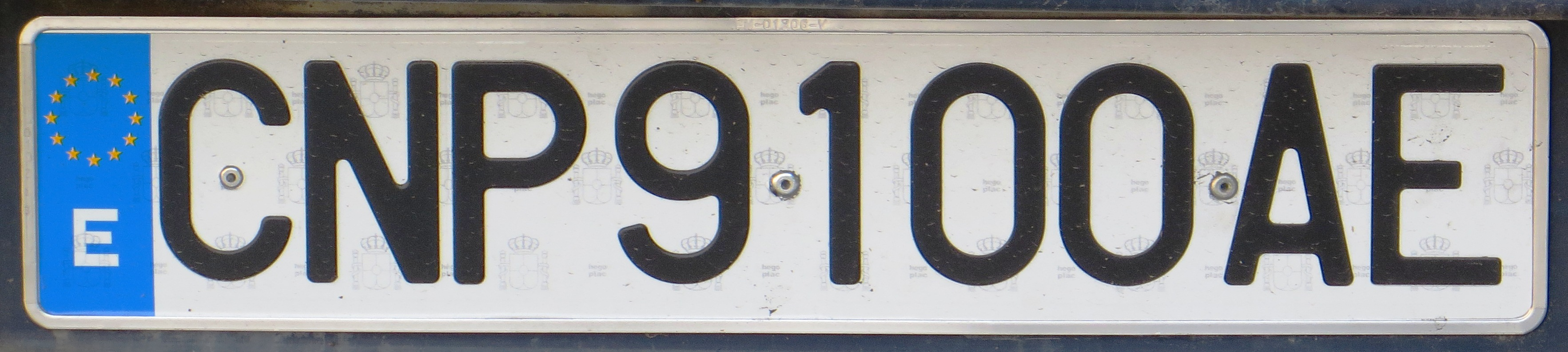 Spanje kentekenplaat Cuerpo Nacional de Policia